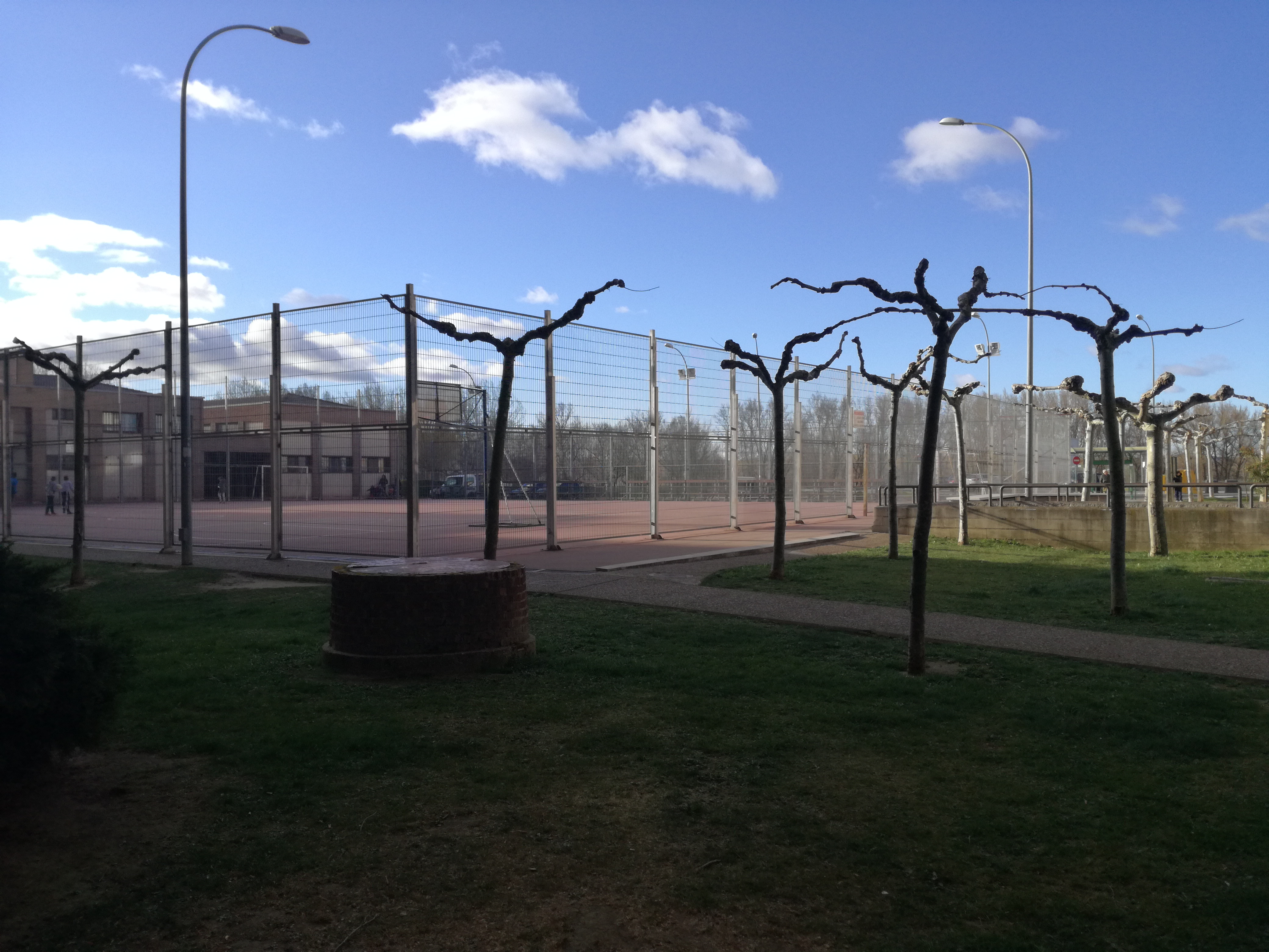 Pistas de baloncesto y fútbol de la urbanización los Olmillos (Palencia)